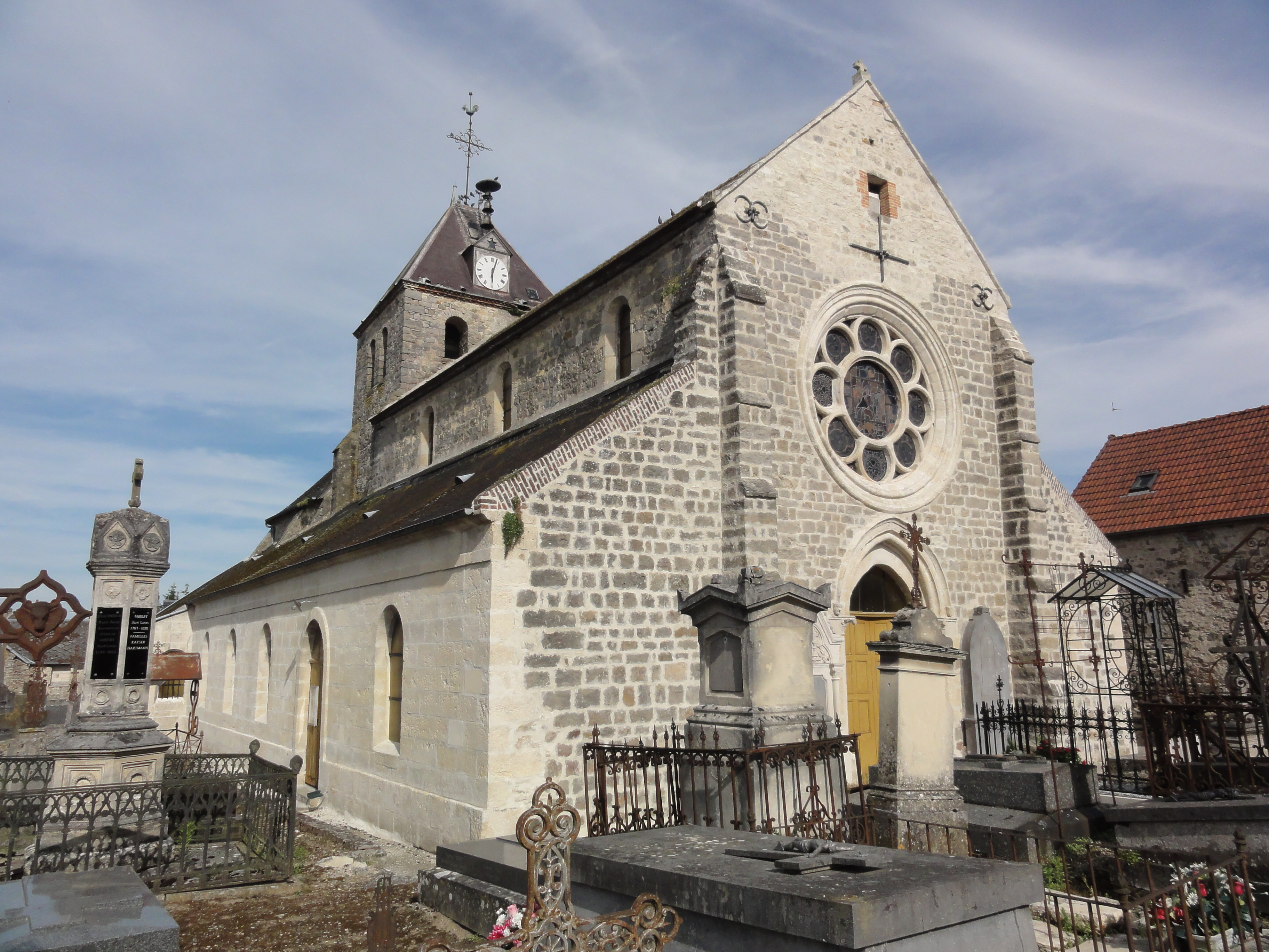 Mauregny-en-Haye (Aisne) église